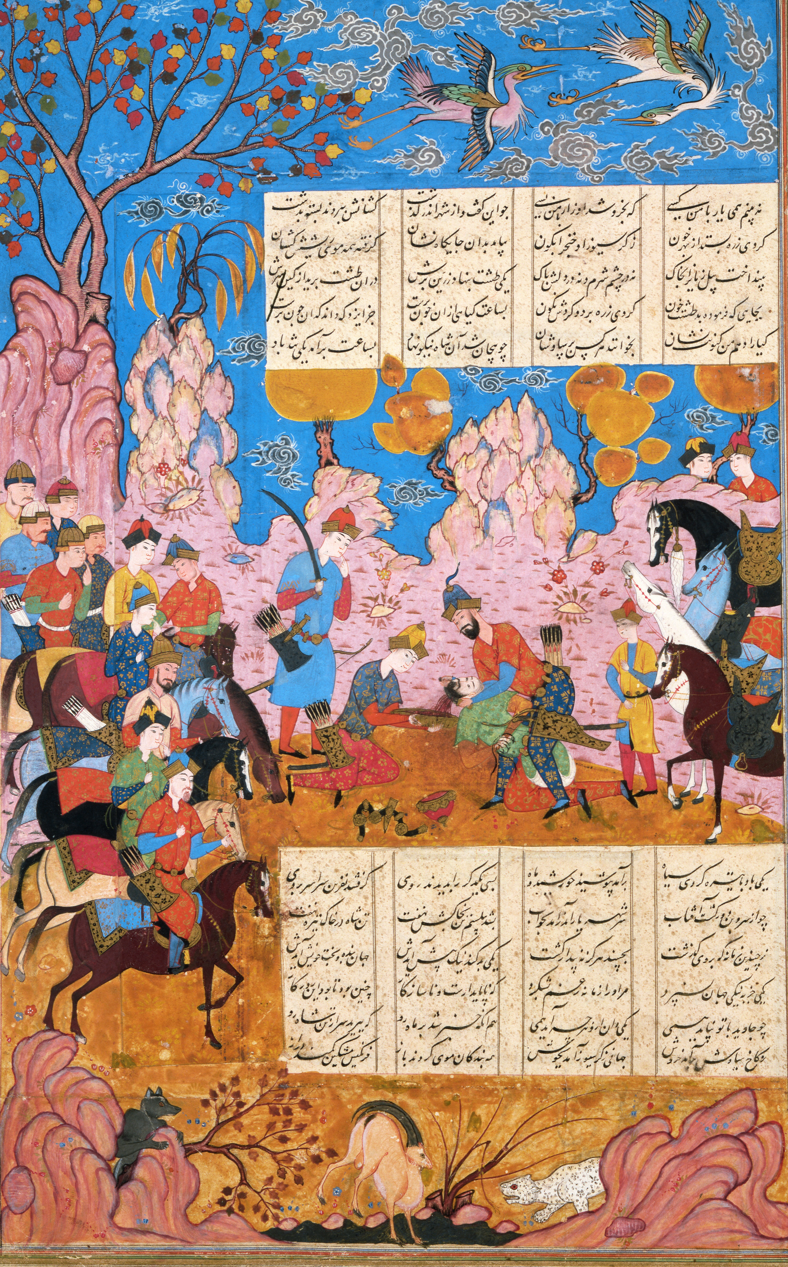 Morte de Seoses